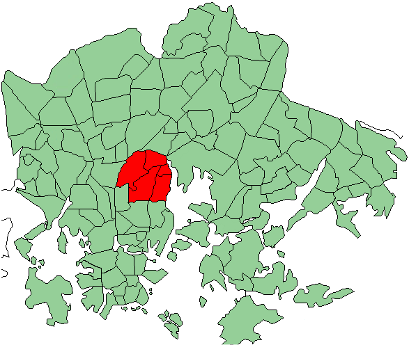 Districts of Helsinki, Vanhakaupunki area/district highlighted (in Finnish: Vanhakaupungin peruspiiri korostettuna)